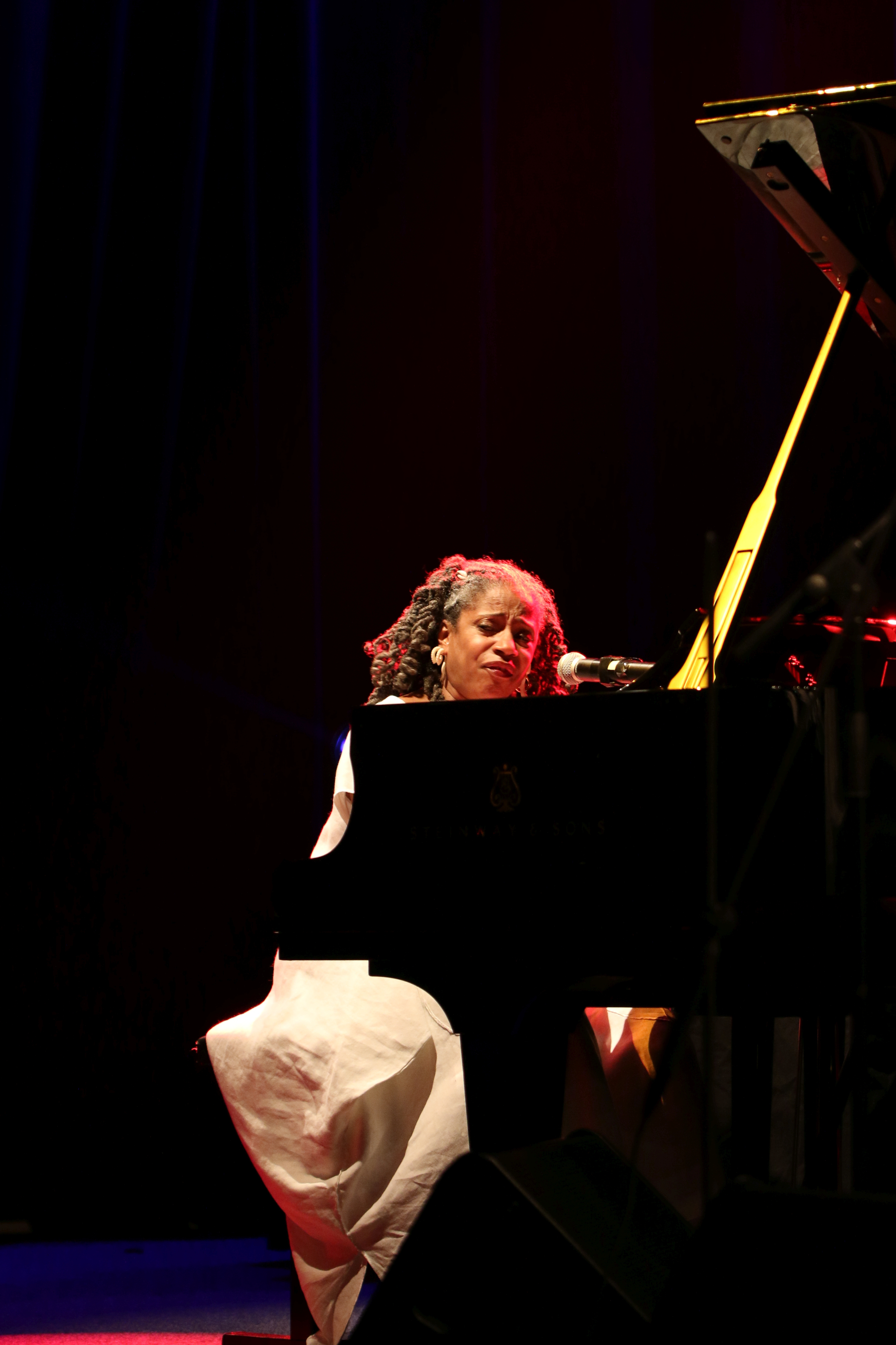 46. Deutsches Jazzfestival Frankfurt 2015: AACM Vocal Ensemble: Ann Ward